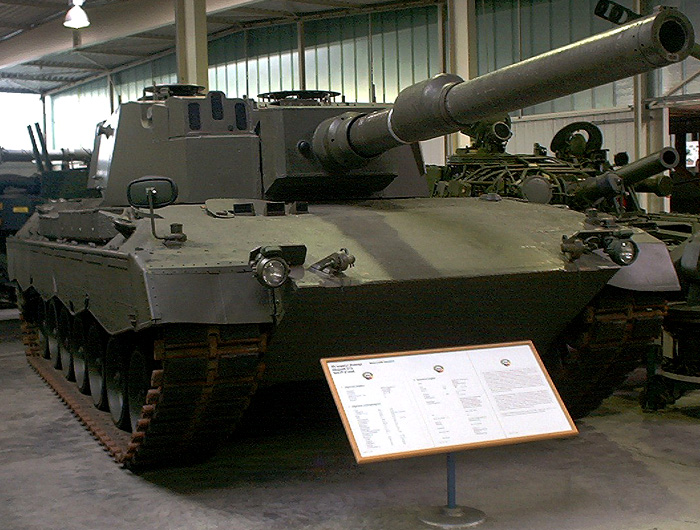 Leopard 2 Prototyp ausgestellt in der Wehrtechnischen Studiensammlung Koblenz